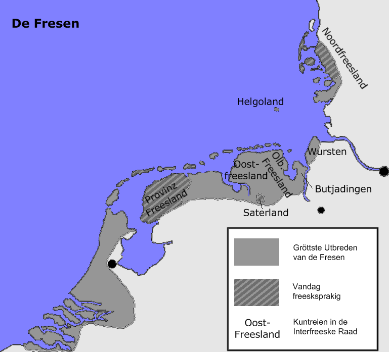 Kaart van dat (vörmalske) Rebeet van`t Freeske Siedeln, freesk Spraakrebeet van vandag un Leden van de Interfreeske Raad.